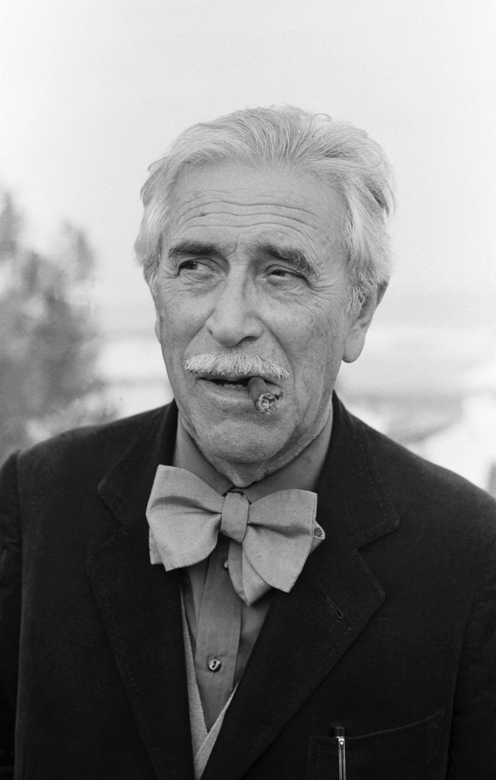 Lo scrittore Mario Soldati